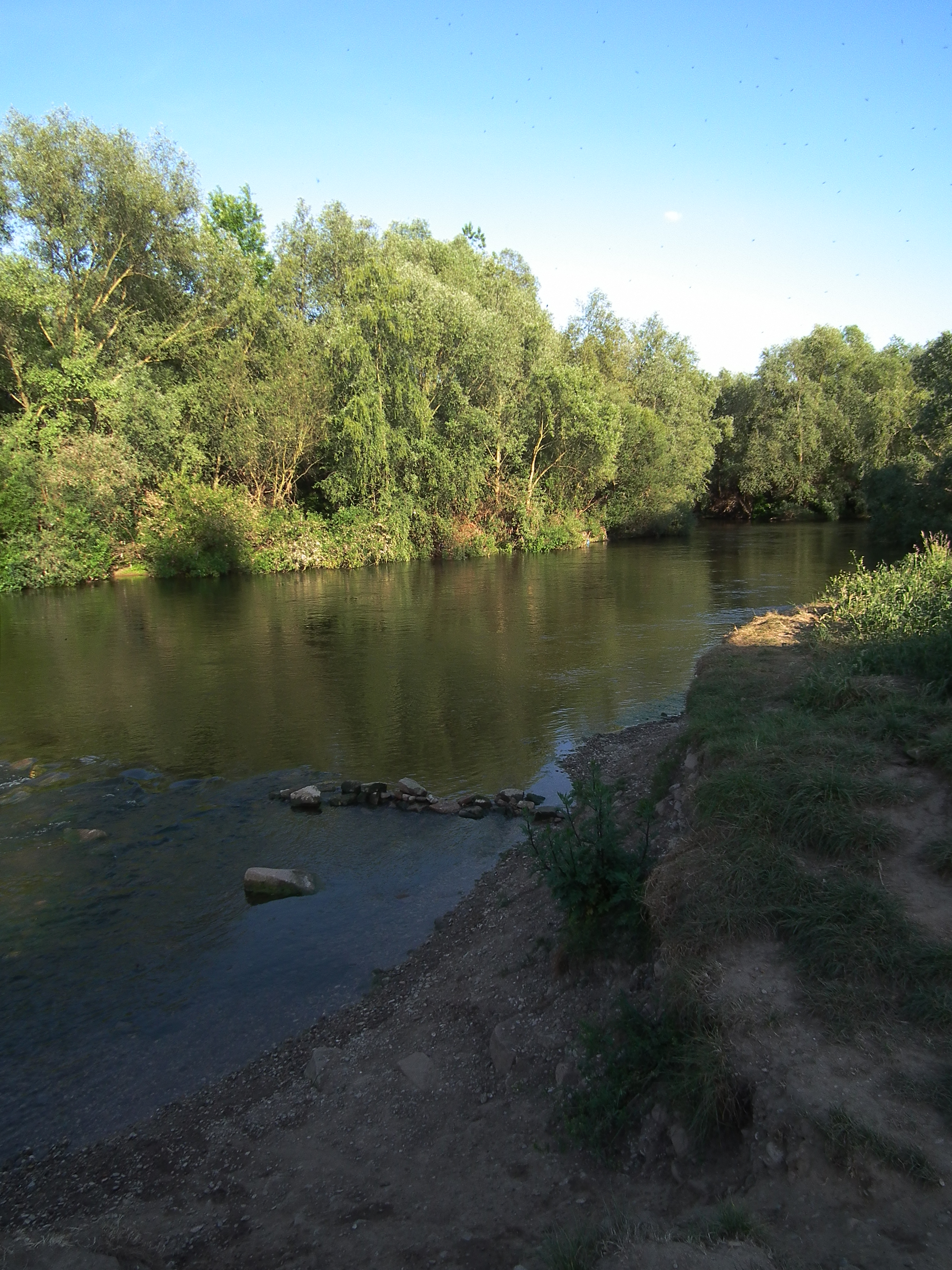 Neckar und Naturschutzgebiet im Heidelberger Stadtteil Wieblingen (Baden-Württemberg, Deutschland)